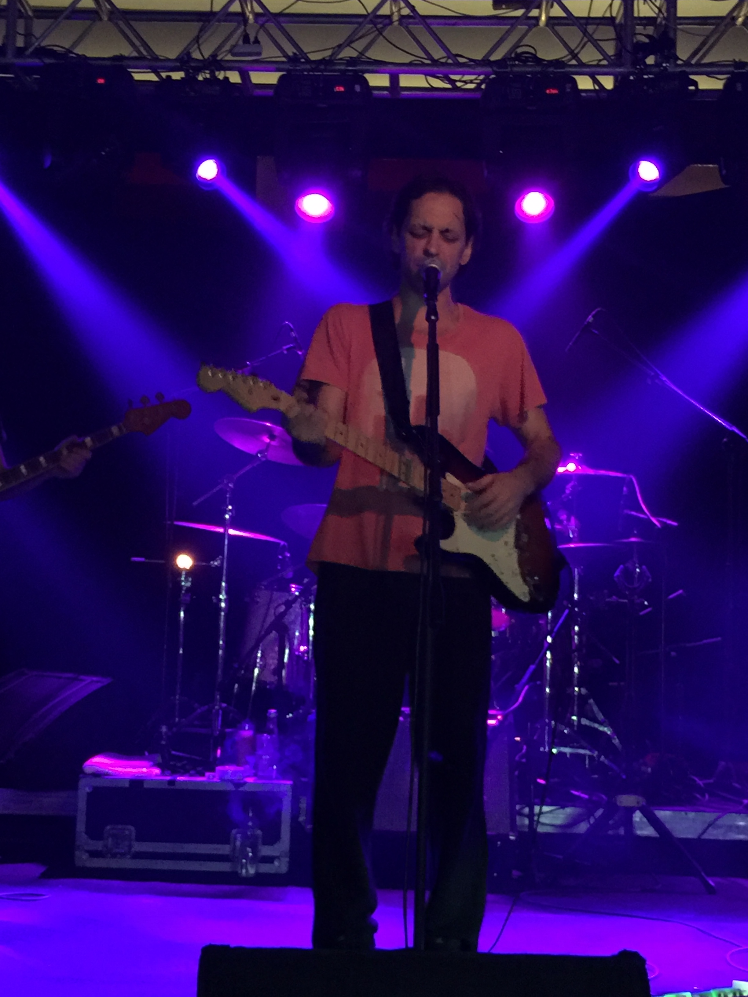 Kaan Tangöze, Diyarbakır, 2015.